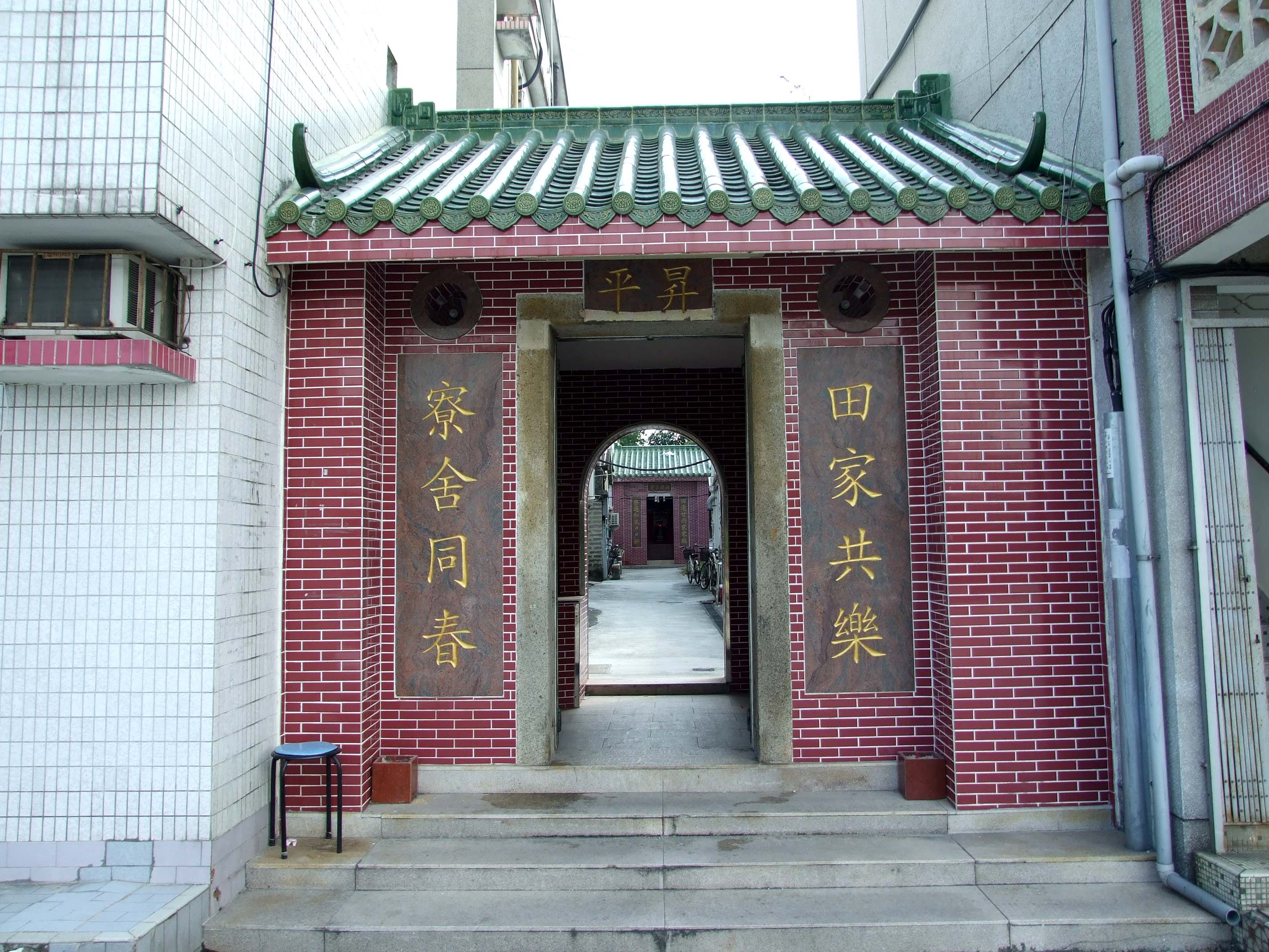 中文（香港）: 十八鄉田寮村圍門